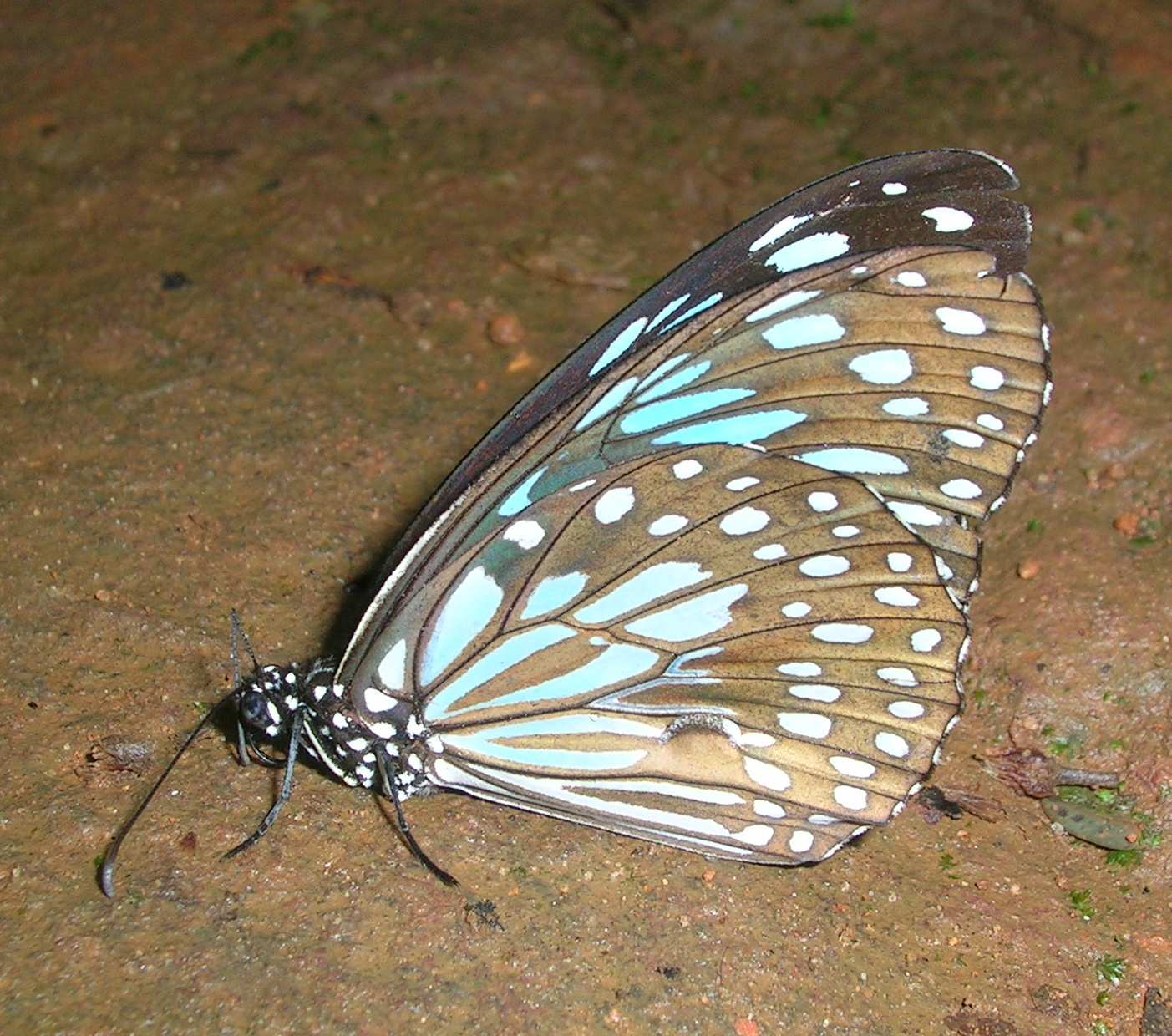 Dark blue Tiger, Tirumala septentrionis, Wayanad, Kerala